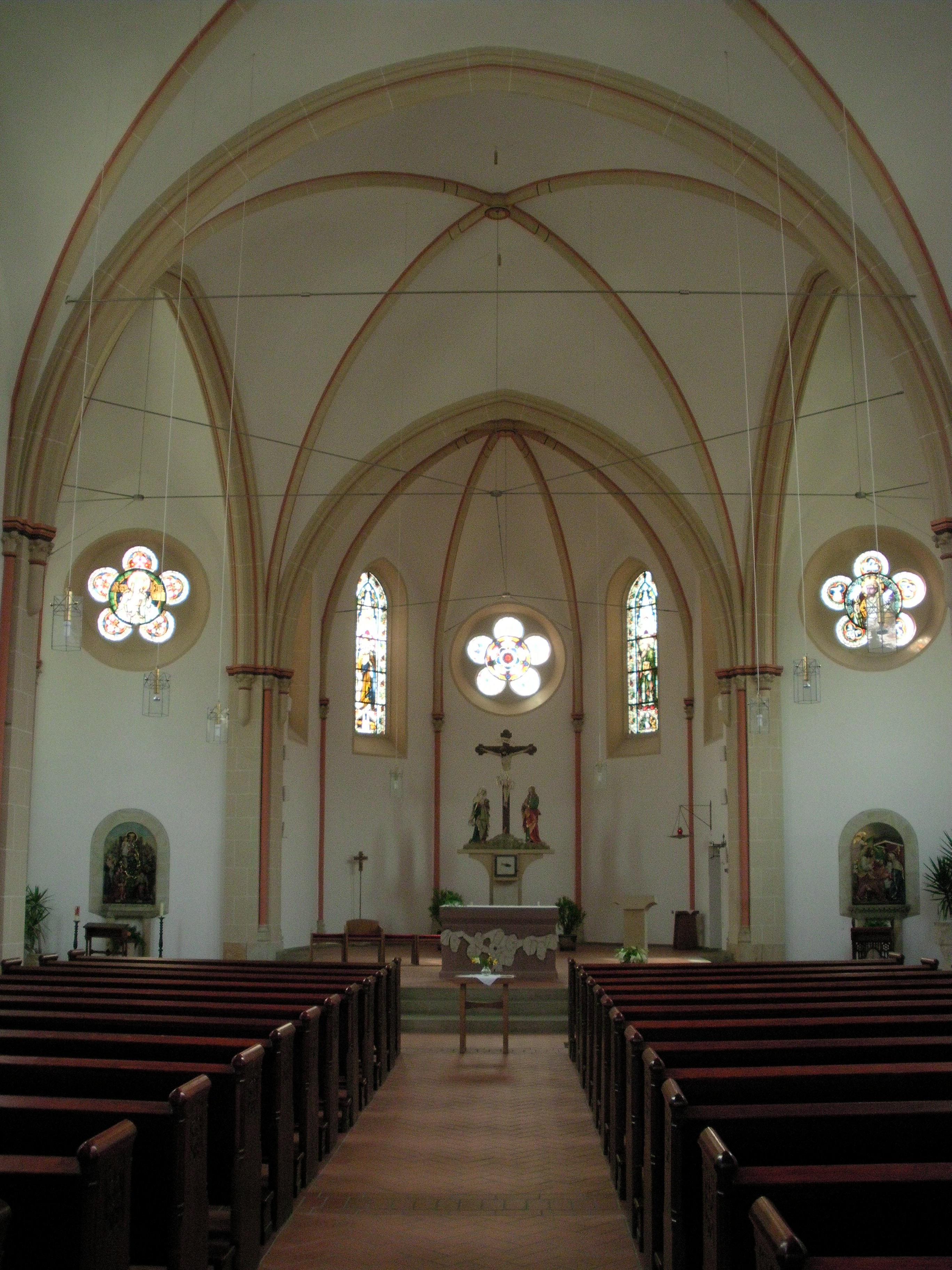 Herz-Jesu-Kirche, Innenraum